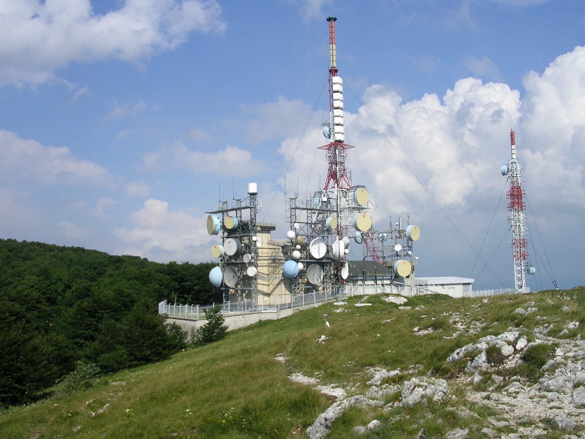 Oddajnik na Nanosu.